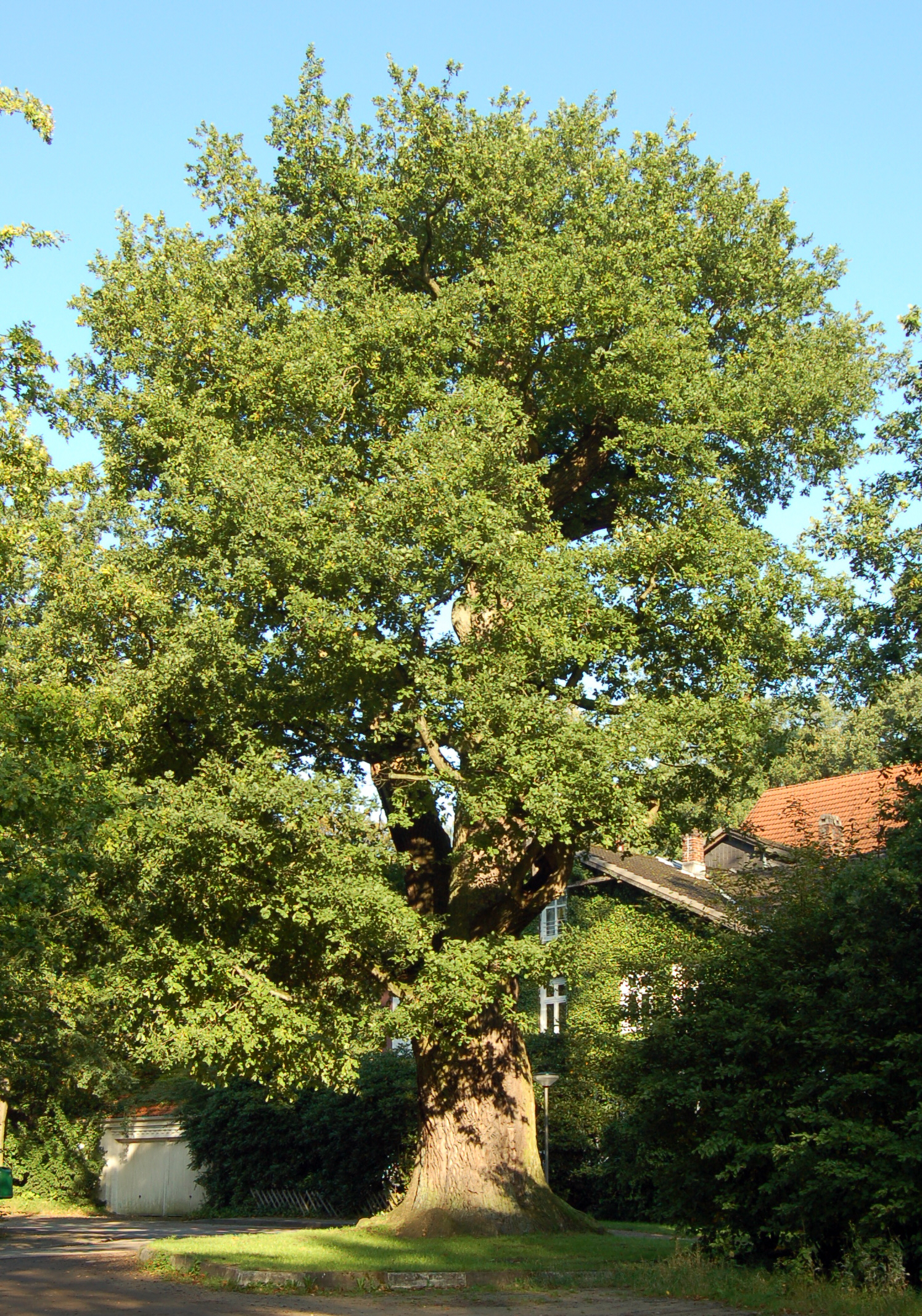 Die etwa 800-850 Jahre alte Eiche von Barmstedt, im Volksmund auch „Tausendjährige Eiche“ genannt, am Rantzauer See in Barmstedt. Es ist der älteste Baum im Kreis Pinneberg und hat einen Stammumfang von 6,70 Metern in einem Meter Höhe.